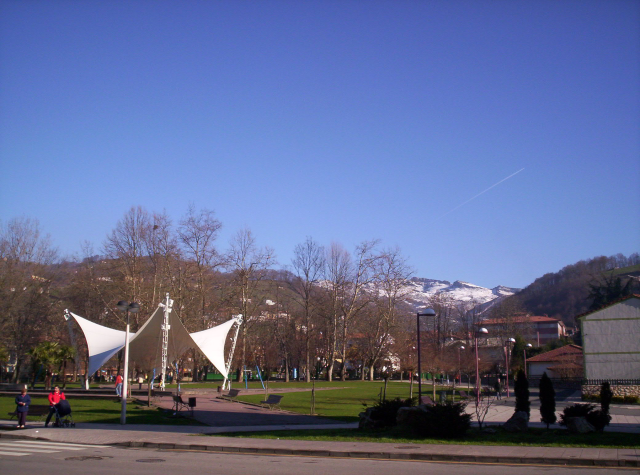 Parque de Pola de Laviana